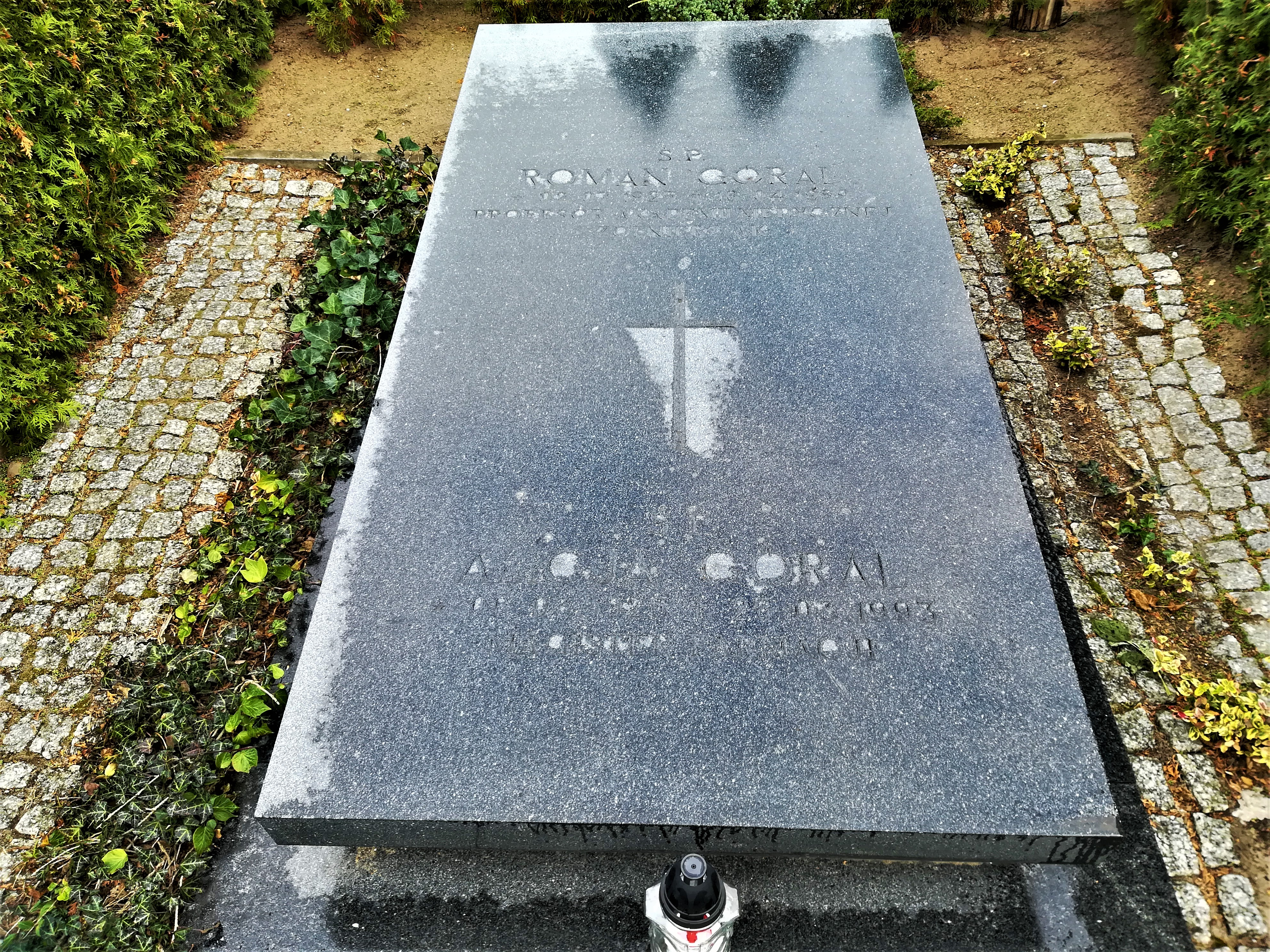 Cm. Junikowo, Poznań. Roman Góral.